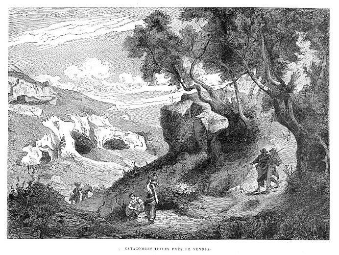 Antica stampa raffigurante le catacombe ebraiche di Venosa